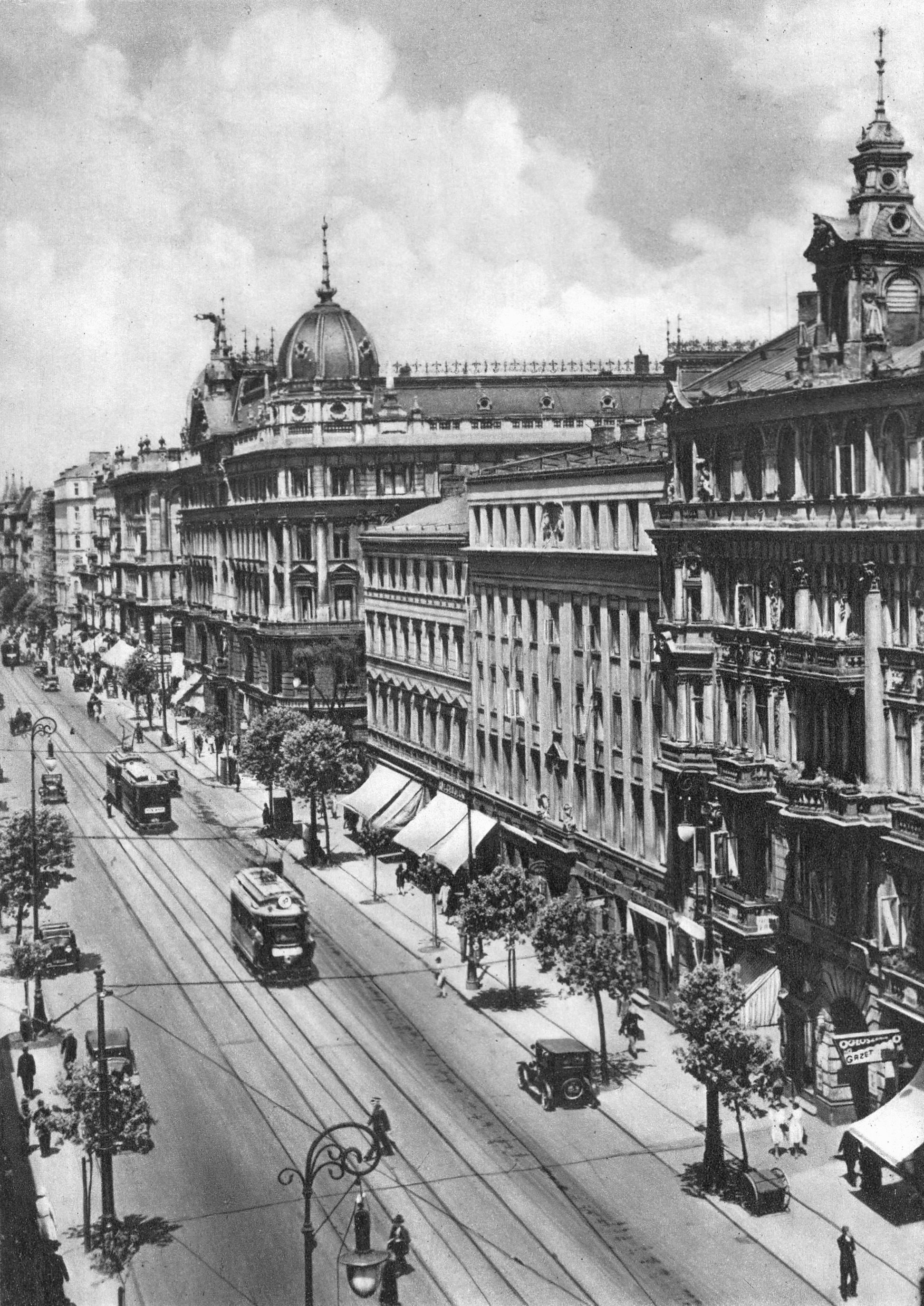 Ulica Marszałkowska w Warszawie